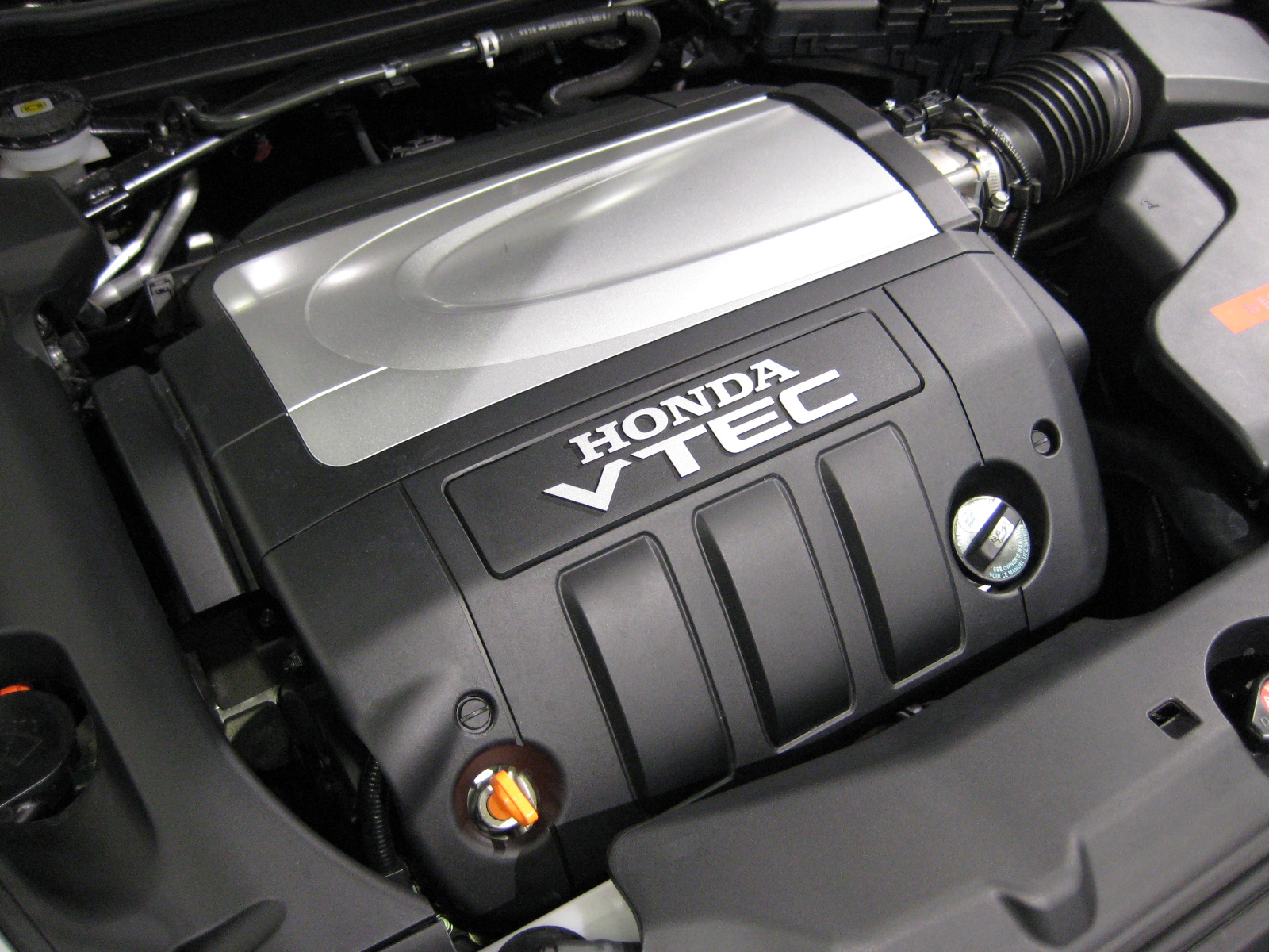 Honda J35A 3.5L SOHC VTEC Engine on 2007 Honda Legend